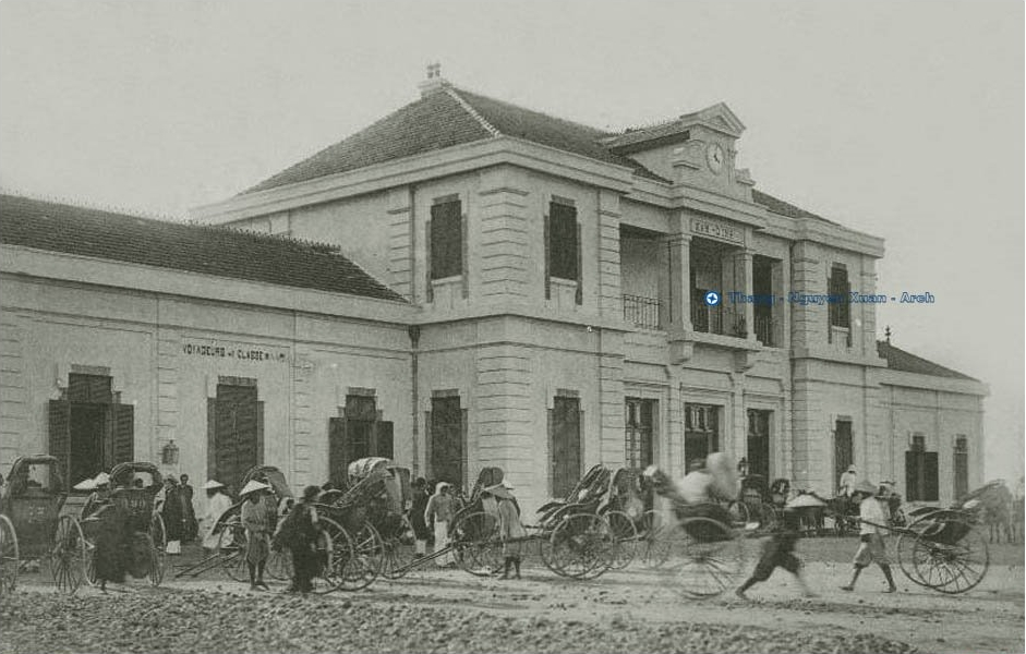 Ảnh chụp Ga Nam Định thời Pháp thuộc, tức giai đoạn cuối thời Nguyễn.